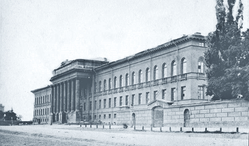 Università di Kiev Taras Ševčenko